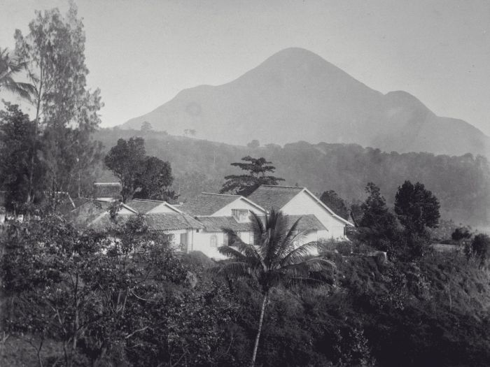 Foto. Gezicht op Hotel Prigen en de Gunung Penanggungan